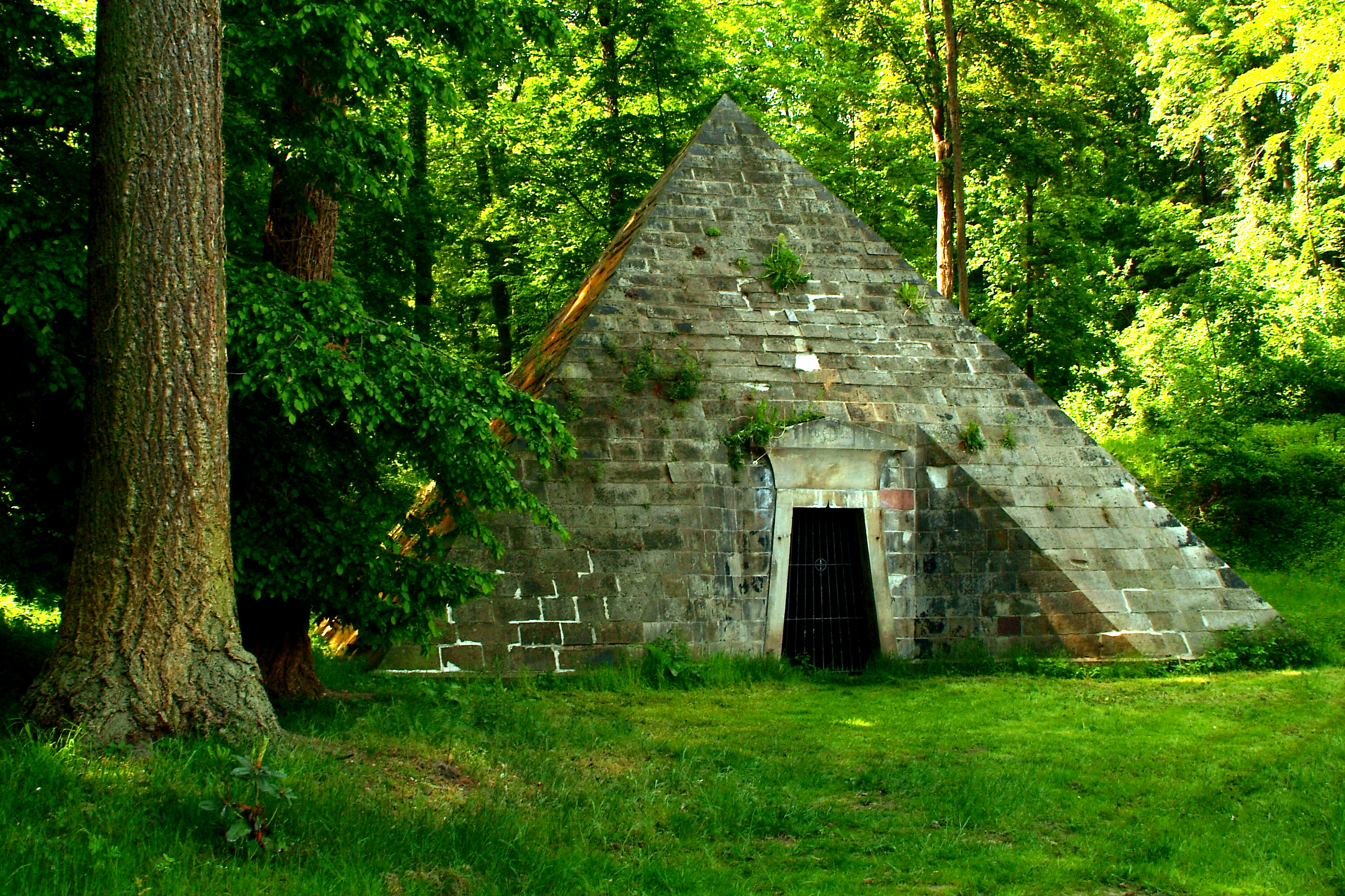 Auswahl von Ansichten aus Emmerthal-Hämelschenburg, die Ortschaft rund um Schloss Hämelschenburg mit ihren jahrhundertealten Geschichten bis in die Gegenwart.